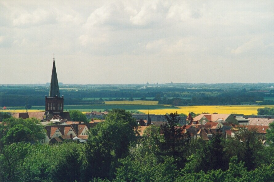 Bergen auf Rügen - Blick vom Rugard-Turm bis nach Stralsund. Im Vordergrund erkennt man den Stadtkern mit der Marienkirche. Am Horizont erscheinen die Kirchtürme von Stralsund, welche ca. 25km Luftlinie entfernt sind.